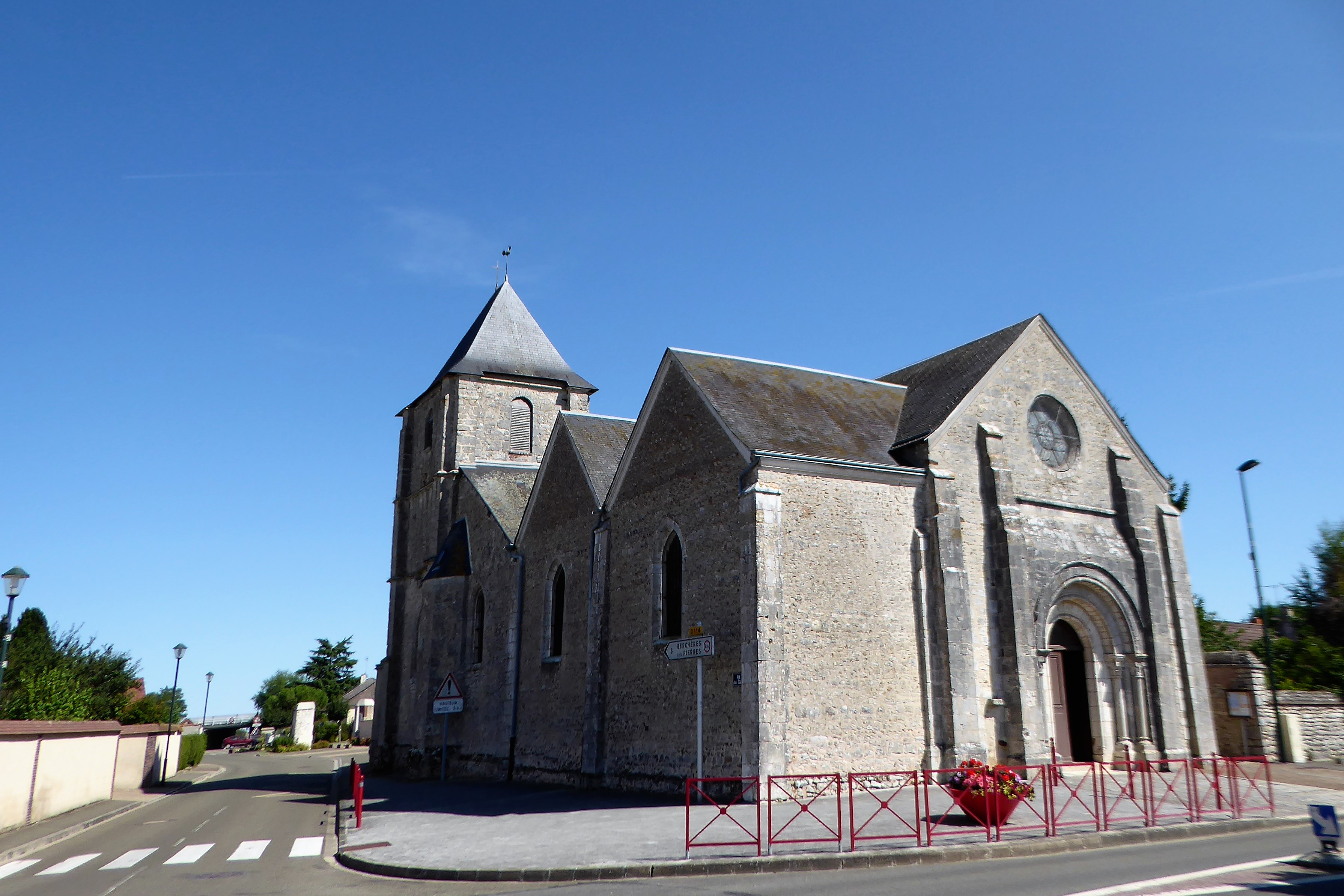 église Saint-Germain, Morancez, Eure-et-Loir (France).